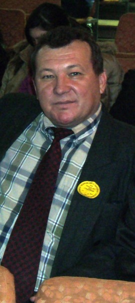 занет ,поэт